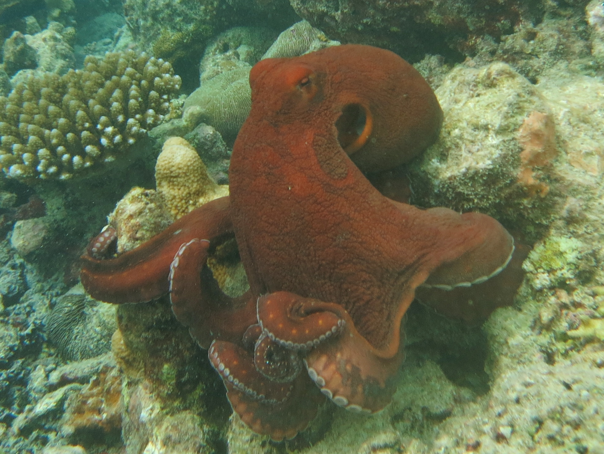 Un poulpe de récifs commun (Octopus cyanea) aux Maldives (atoll de Baa)